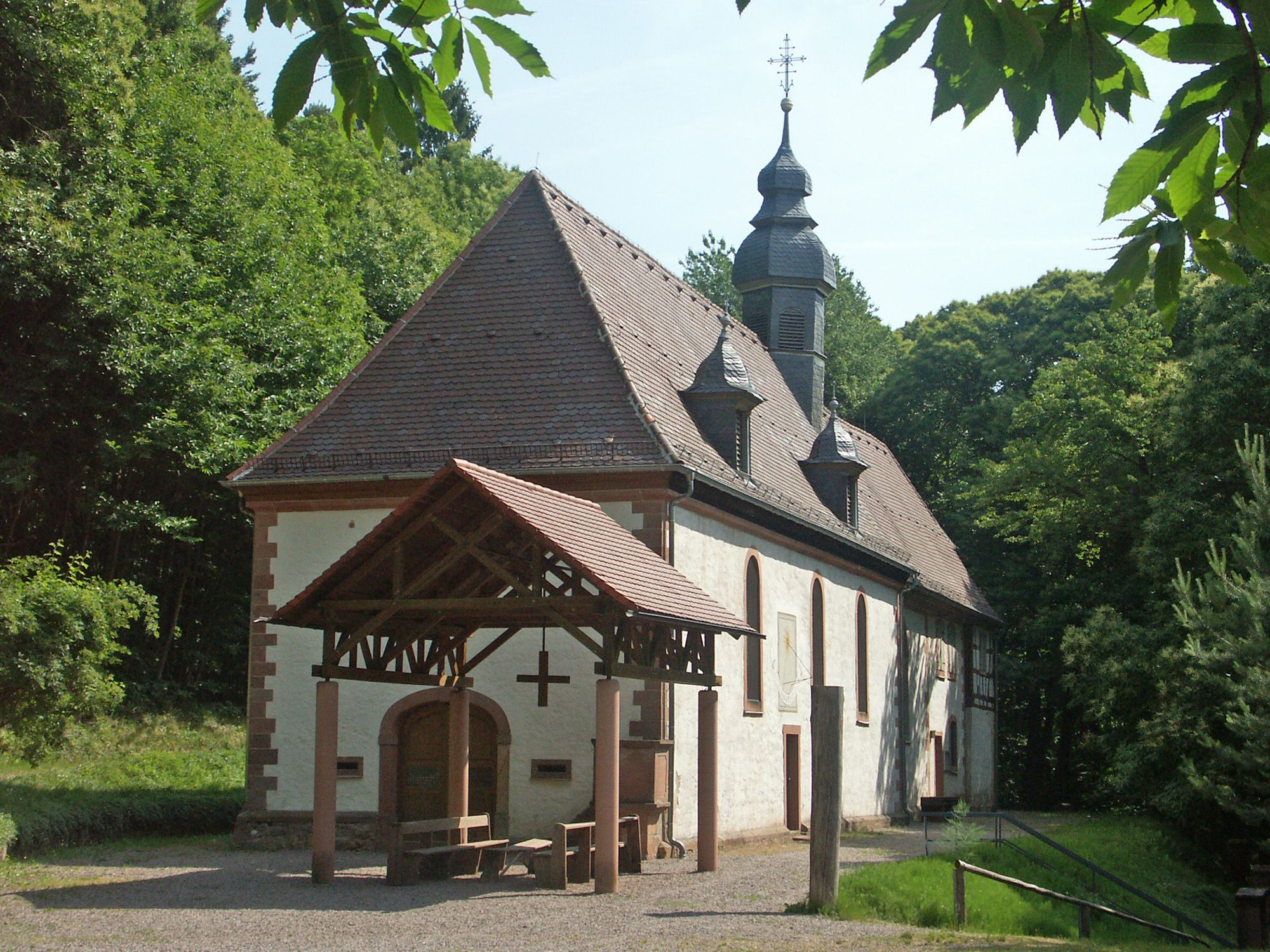 Die Wallfahrtskapelle "Unsere liebe Frau vom Kolmerberg" bei Dörrenbach